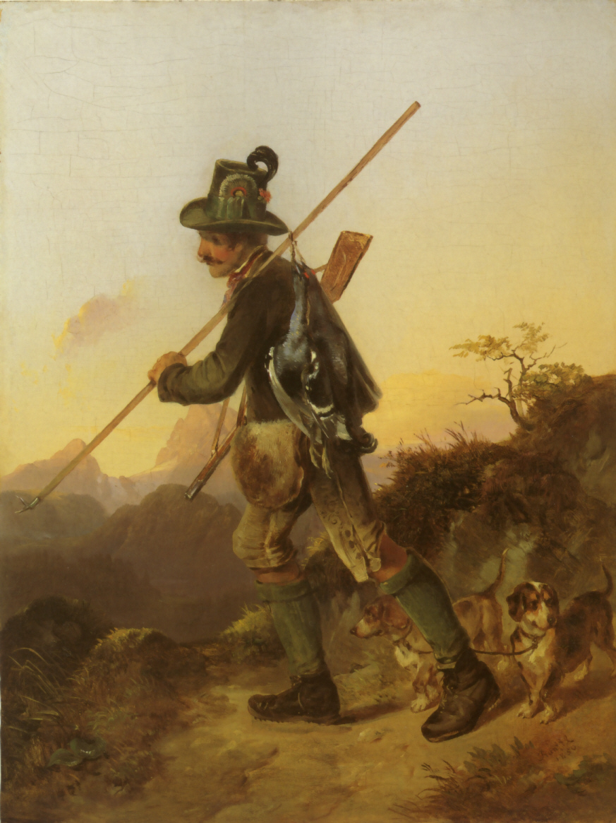 Jäger mit Birkhähnen oberhalb von Berchtesgaden, im Hintergrund der Watzmann